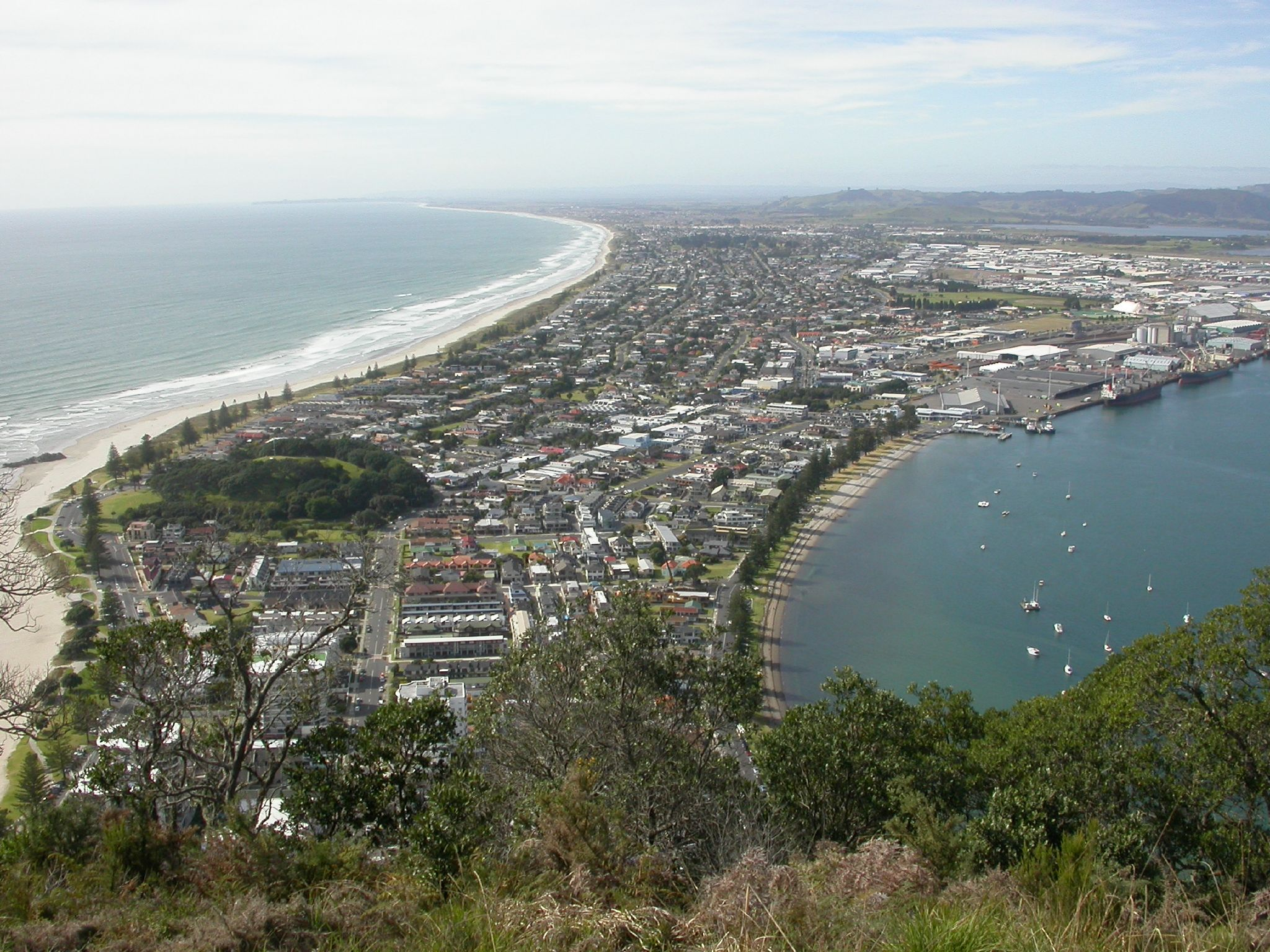 Mt. Manganui, Tauranga from Mt. Manganui, looking south. Port of Tauranga at the right.